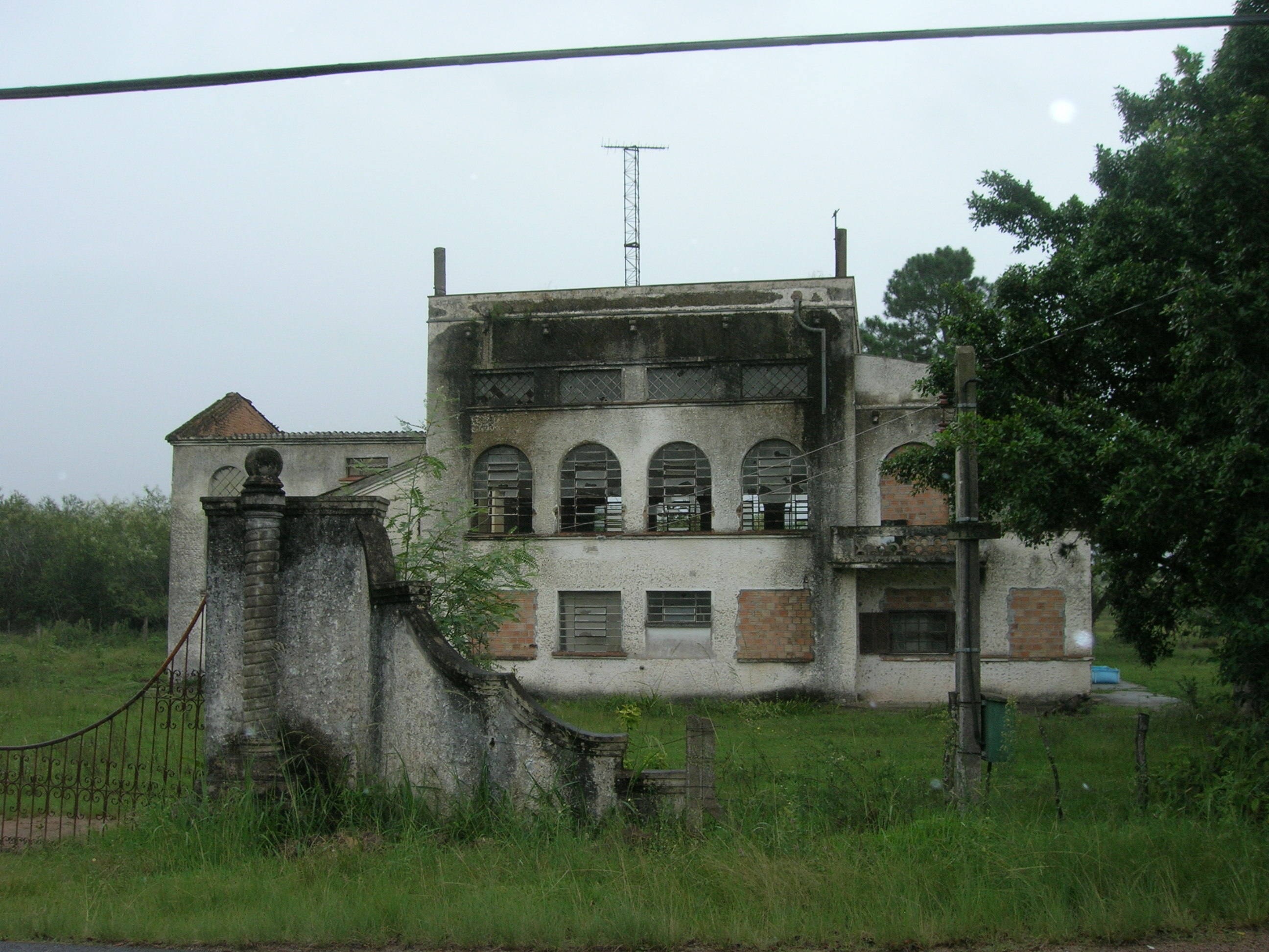 Antigo prédio da estação de rádio Farropilha, no bairro da Ponta Grossa, em Porto Alegre.